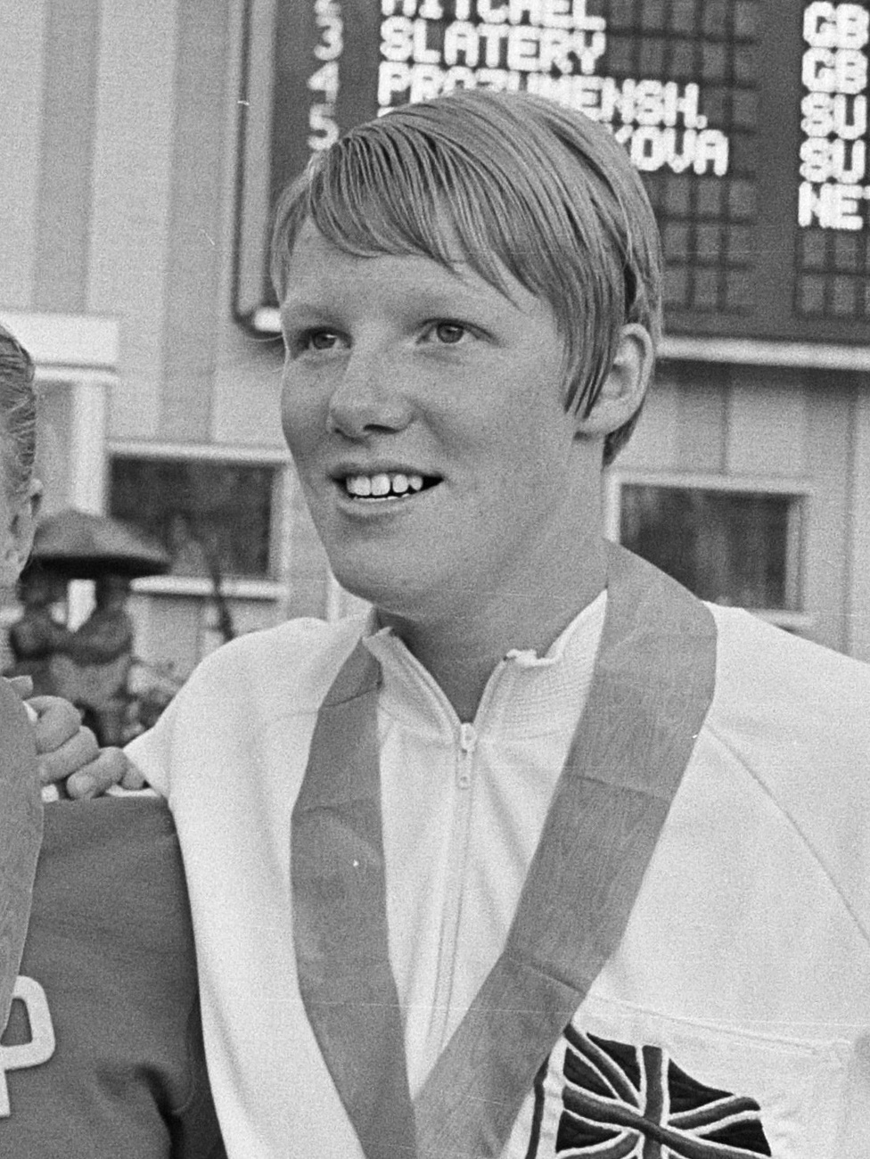 Jill Slattery; European championships, podium 200 m breaststroke